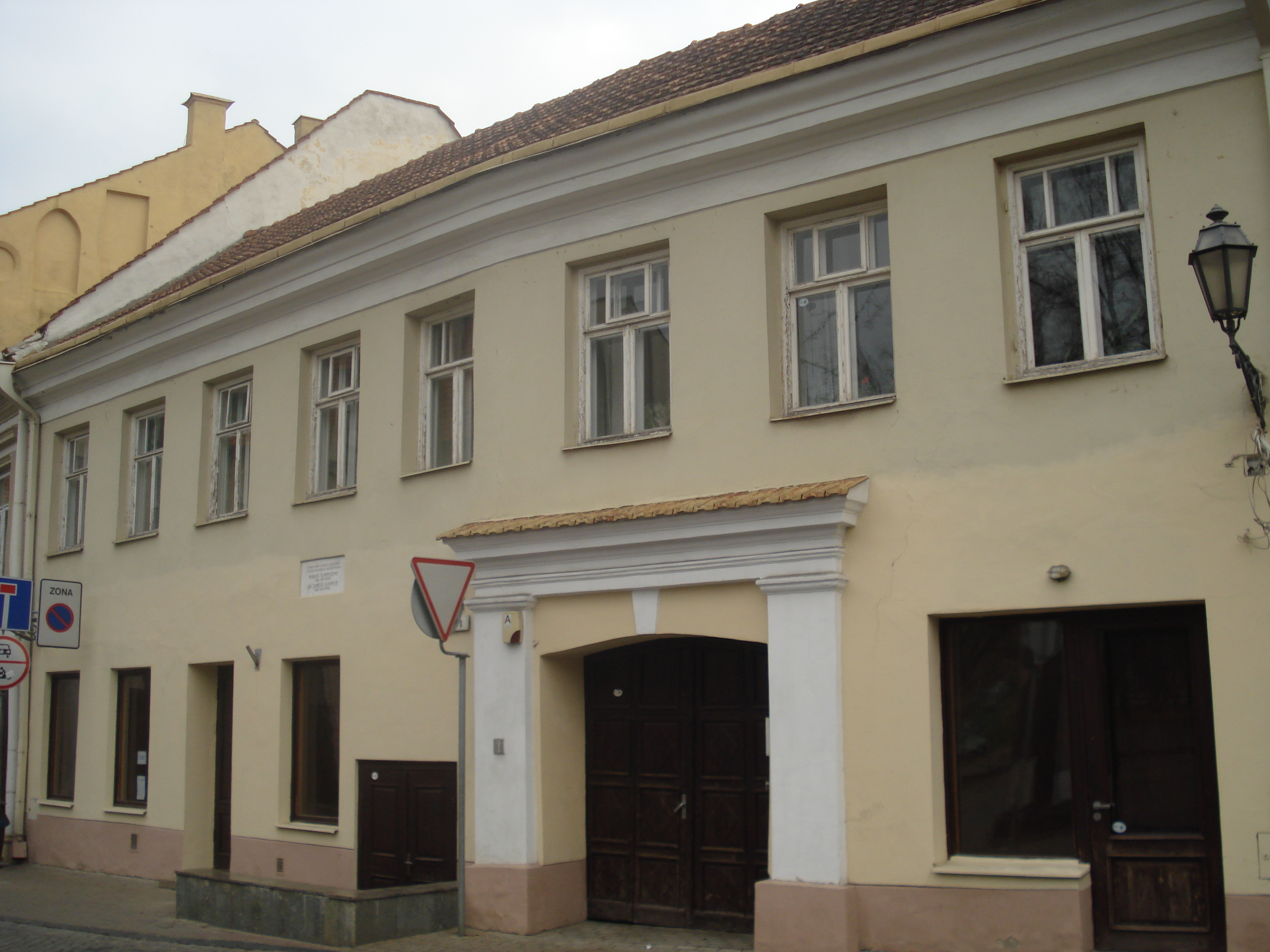 Marija and Jurgis Šlapelis House and Museum in Pilies street in Vilnius (Pilies g. 40)